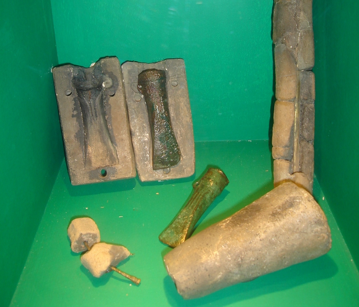 dysza, formy odlewnicze, toporek z tulejką.